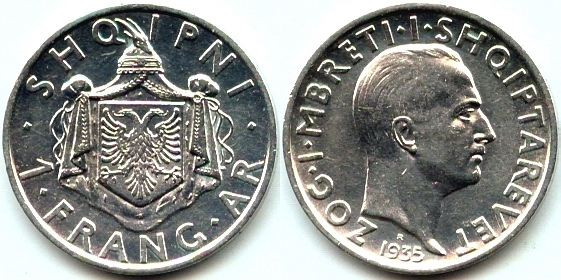 1 албанский франг (франк), 1935